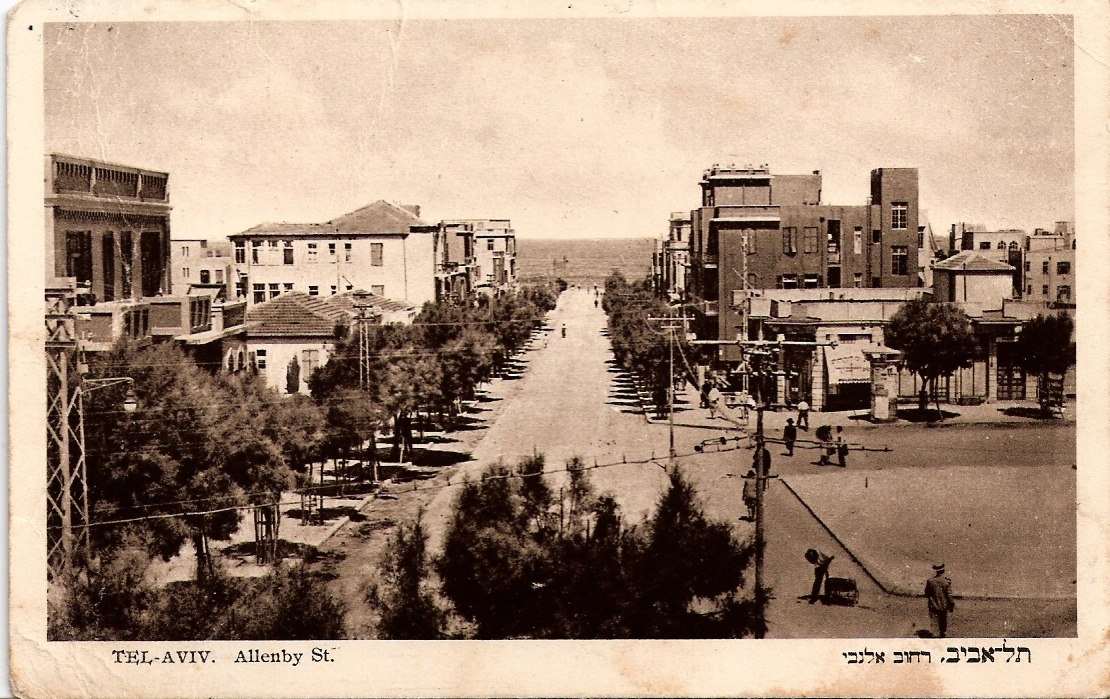 גלויה מאת חיים נחמן ביאליק ליום חתונתו המתארת את תל אביב בראשיתה